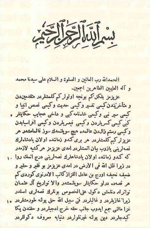 Oruç Bey'in Tevârîh-i Âl-i Osman isimli eserinin Hannover baskısının ilk sayfası.